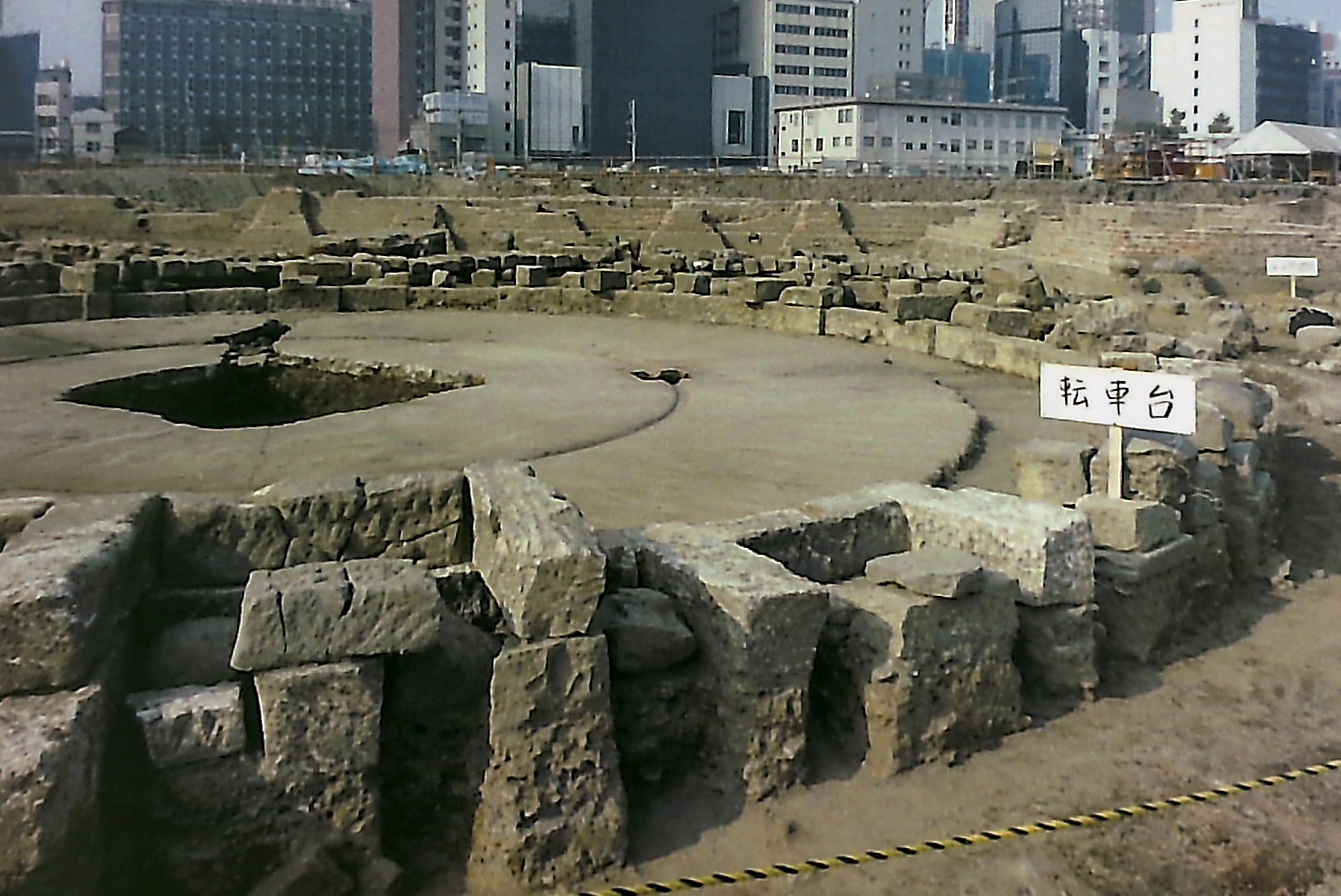 平成5年に開催された汐留遺跡見学会で公開された旧新橋停車場（初代）の転車台の石造基礎。遺構はこの後、さらに下層に眠る江戸時代の遺跡調査のために解体された。（フィルムスキャナーでネガをデジタル画像化）